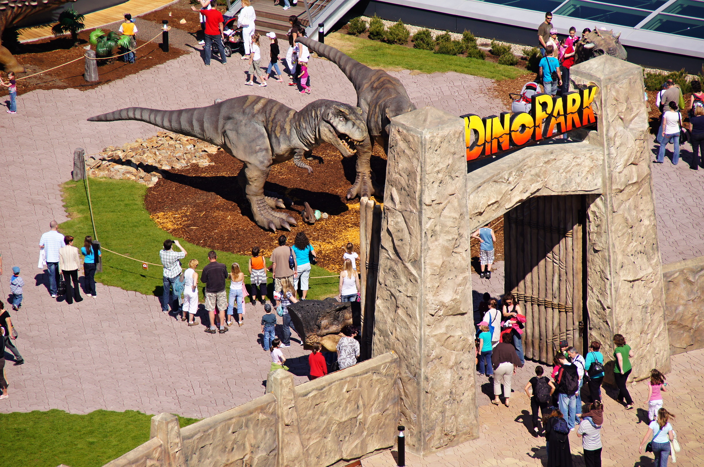 DinoPark Praha, Vstup